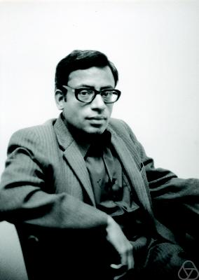 Foto di K. R. Parthasarathy